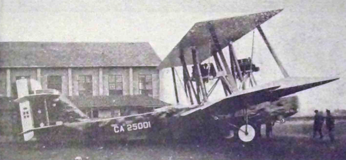 Caproni C.73